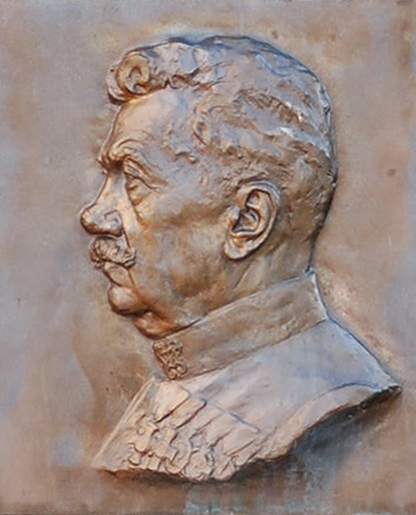 Bad Gams, Denkmal von Eduard Wagnes im Park bei der Pfarrkirche.